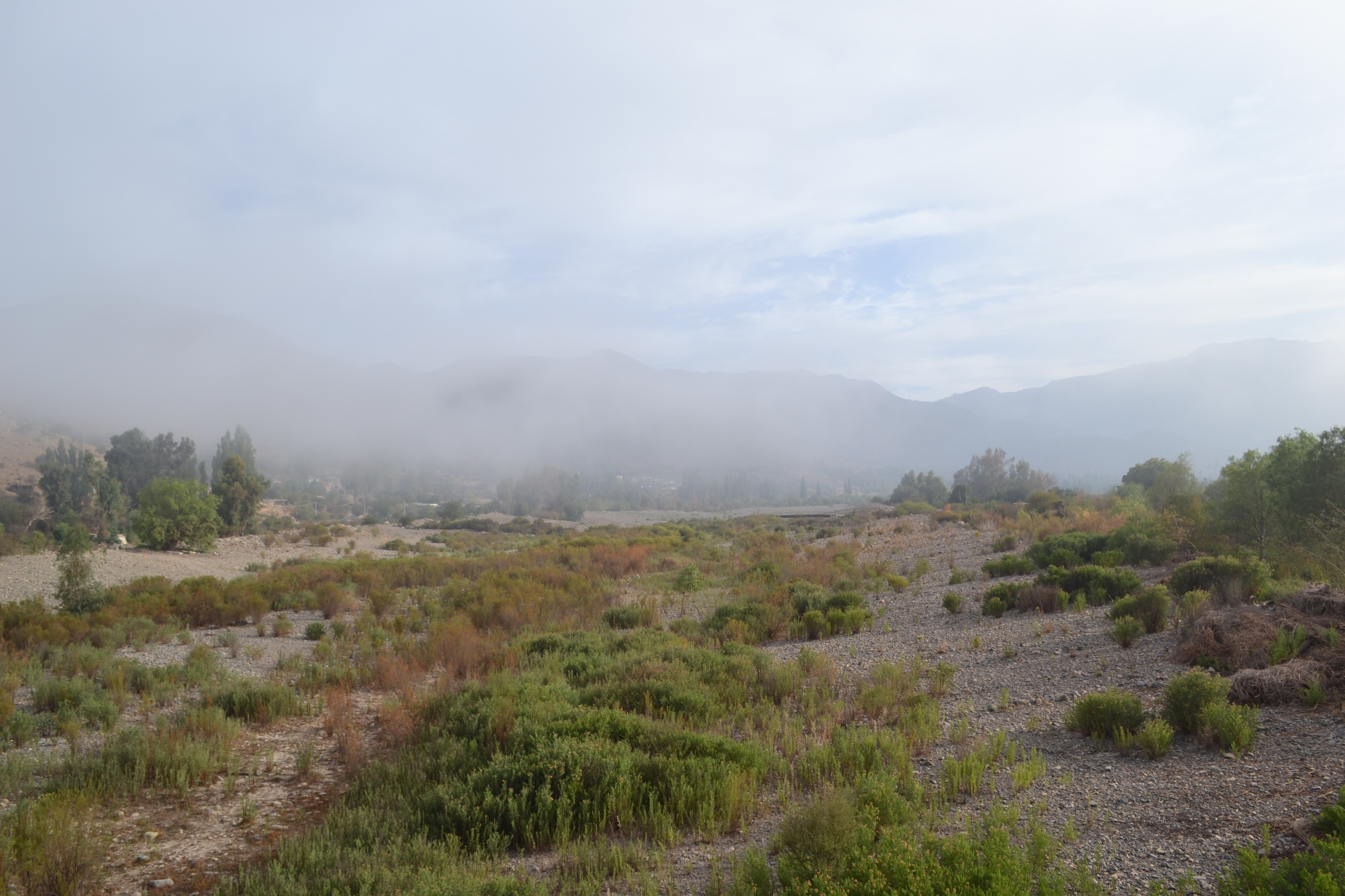 Rio Chalinga